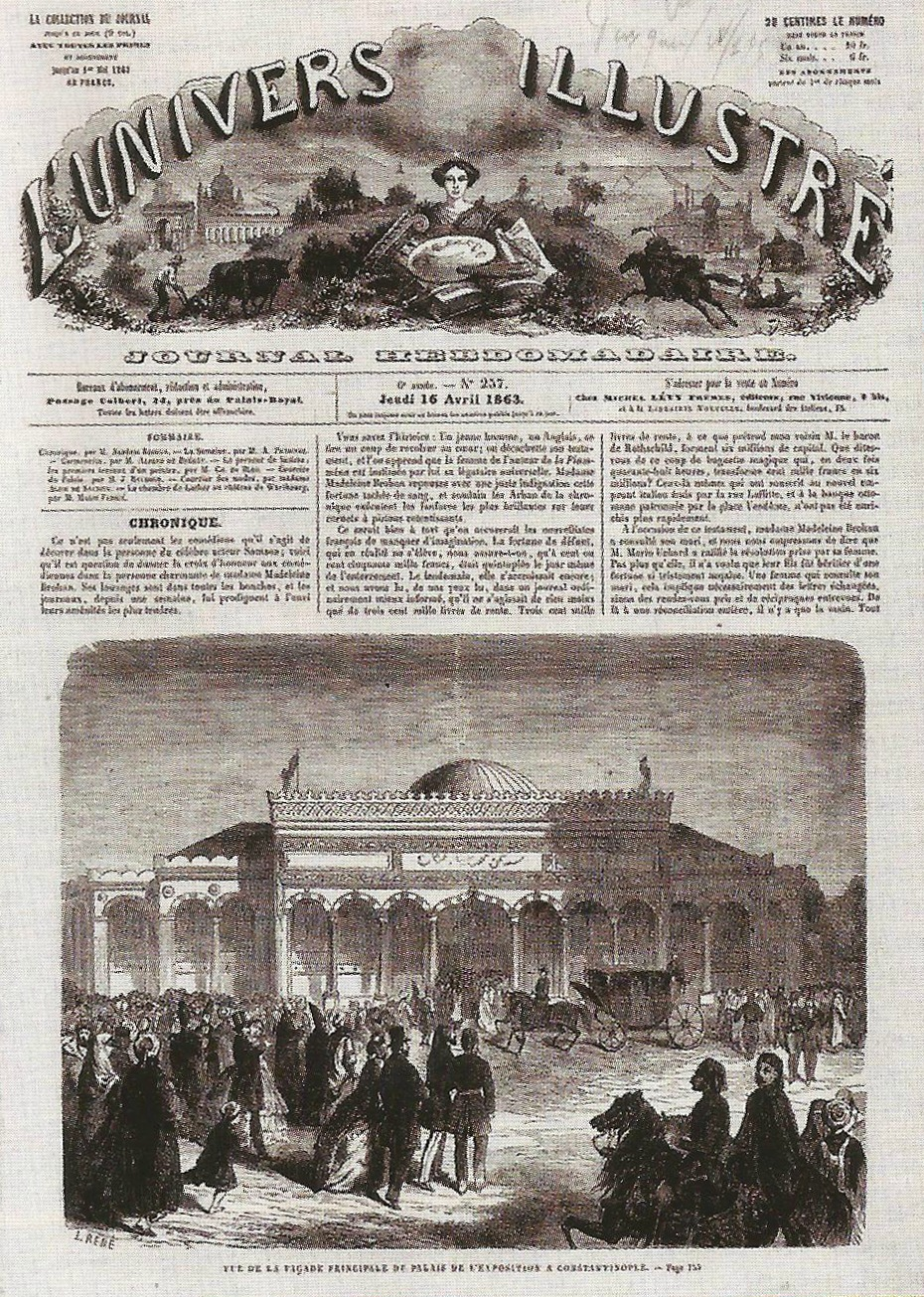 L'Univers illustré'nin Sergi-i Umumi-i Osmani'yi duyuran ilk sayfası.